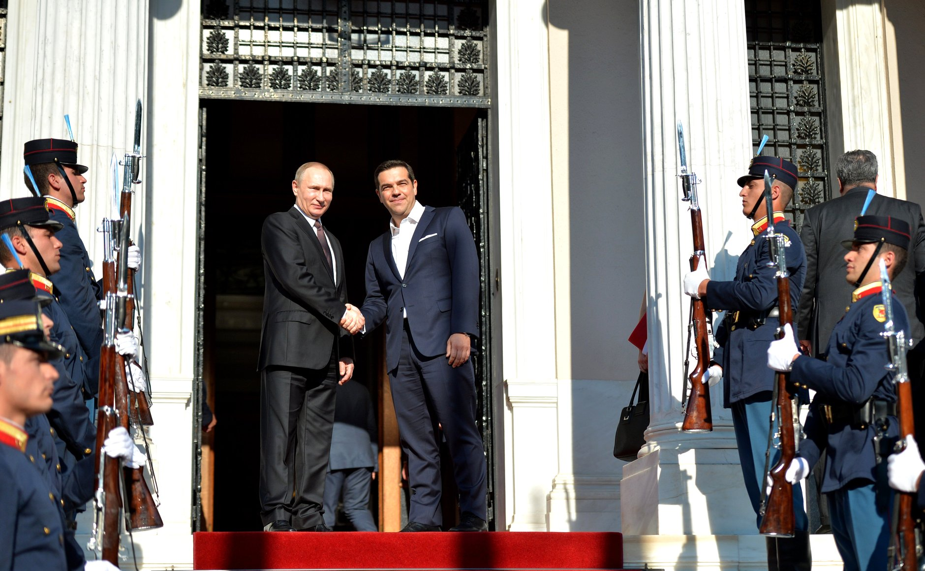 Ο Α. Τσίπρας με τον Β. Πούτιν στο Μ.Μαξίμου